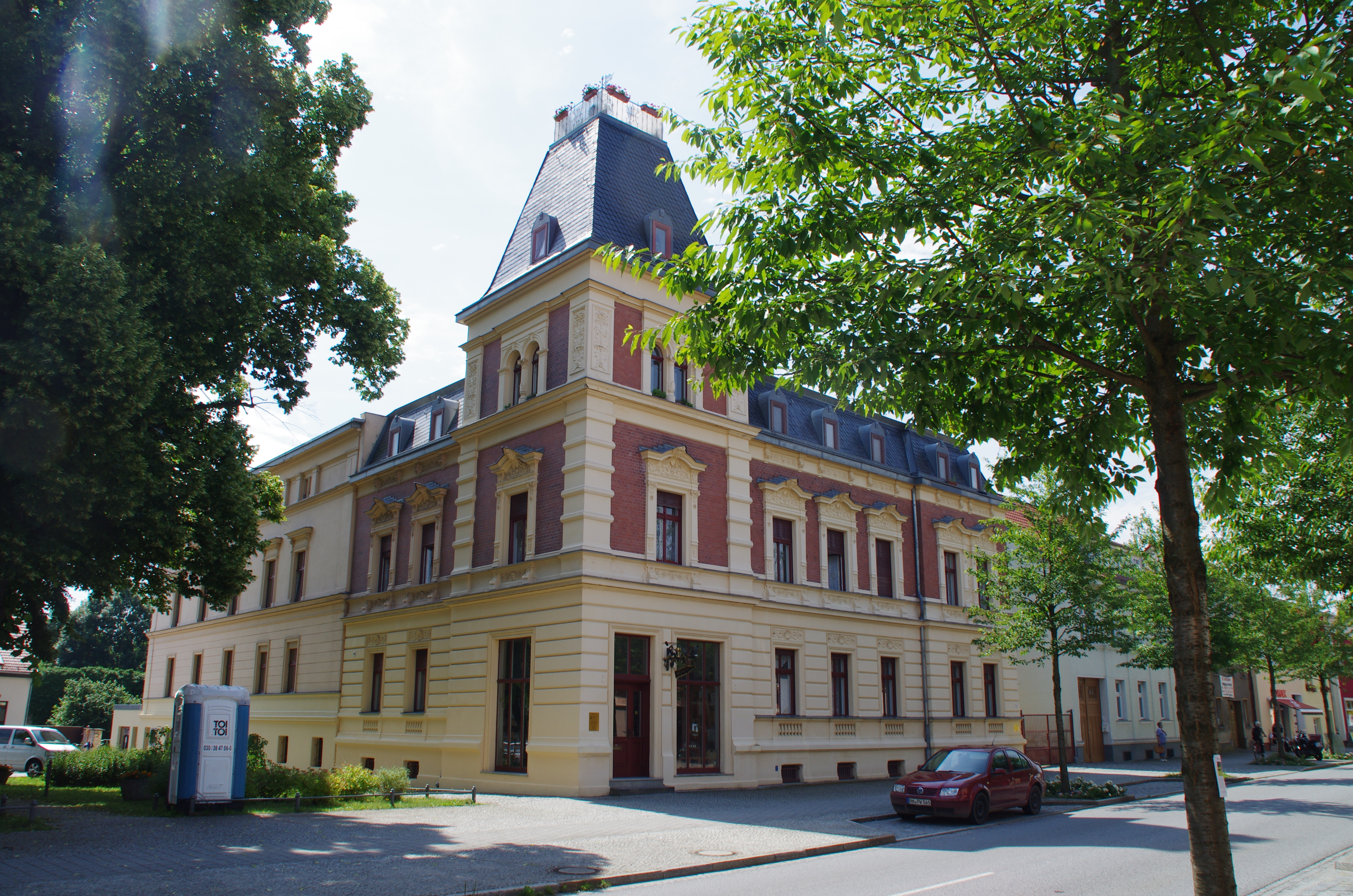 Trebbin in Brandenburg. Das Haus in der Berliner Straße 43 steht unter Denkmalschutz.